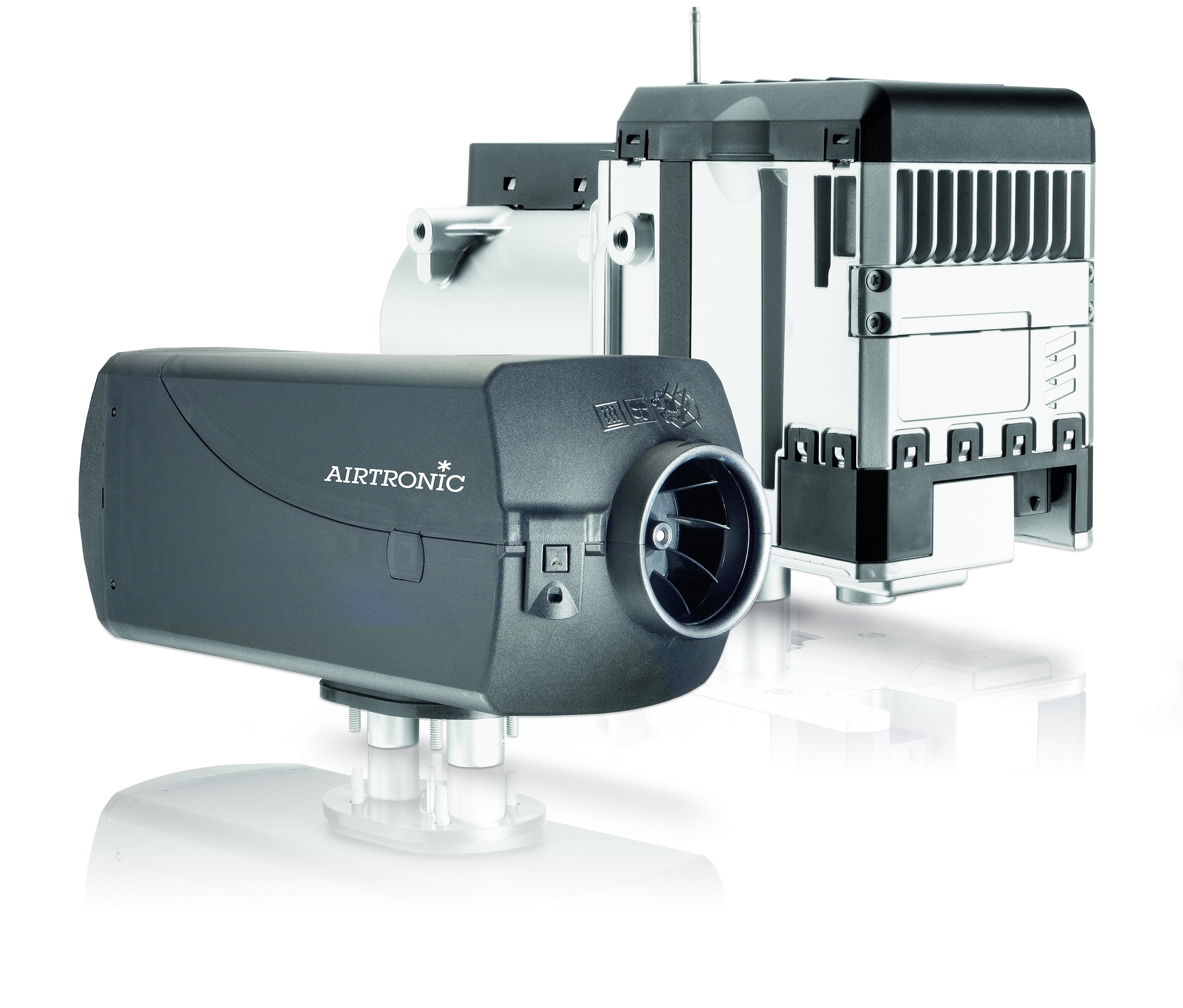 Eberspaecher Luftheizung D4 / Wasserheizung Hydronic M